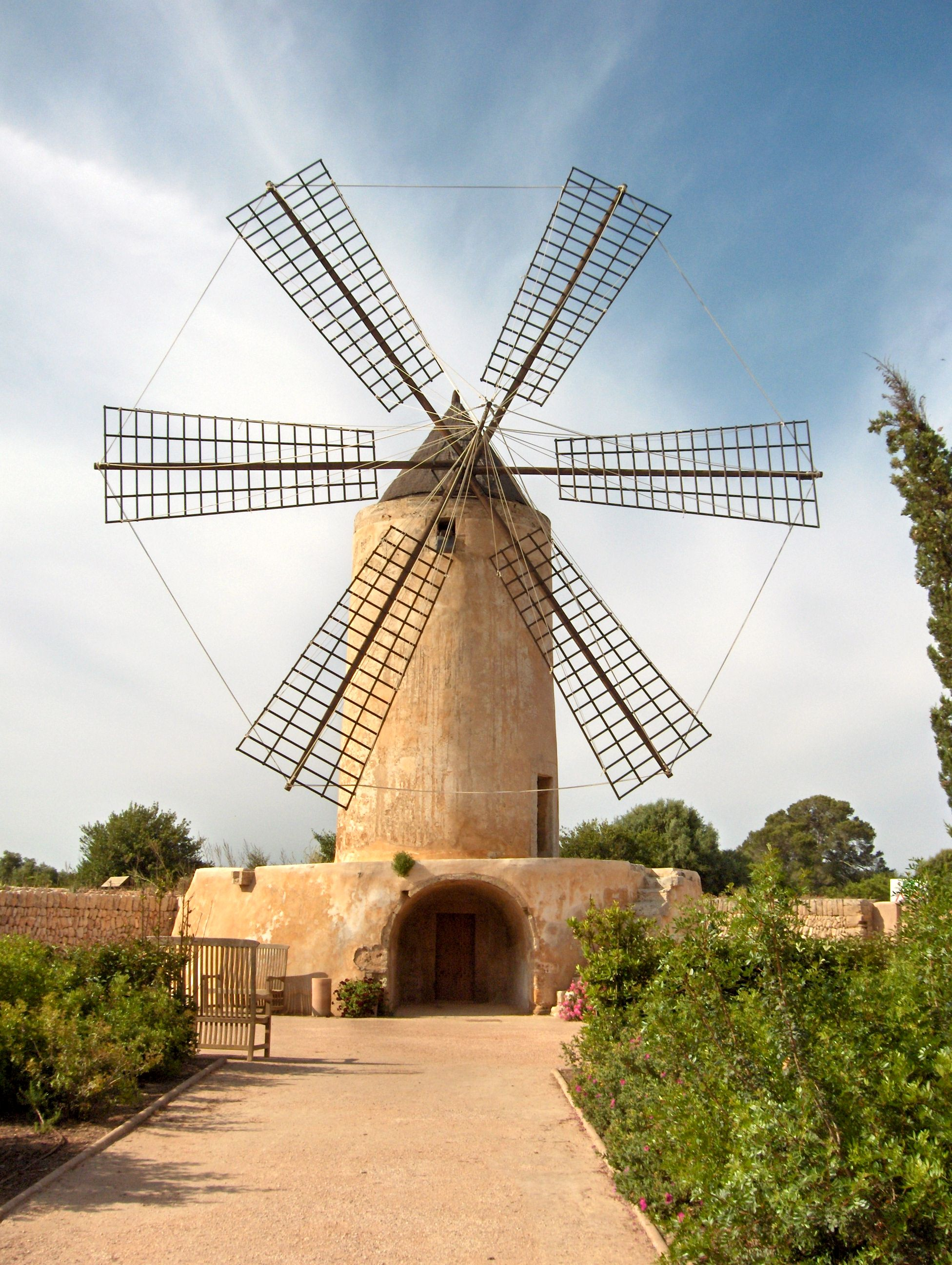 Molí fariner de la possessió de Sa Torre, a la marina de Llucmajor, Mallorca.